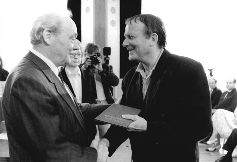 ADN-ZB Uhlemann 15.6.89 Berlin: Auszeichnung Aus Anlaß des 44. Jahrestages der Gründung des FDGB wurden hohe gewerkschaftliche Auszeichnungen sowie der Kunst- und Journalistenpreis verliehen. Der Vorsitzende des Bundesvorstandes des FDGB, Harry Tisch (l), überreichte den Kunstpreis des FDGB 1989 an den Regisseur Wolfgang Kohlhaase für seine hervorragenden Leistungen als Film- und Fernseh-Autor.